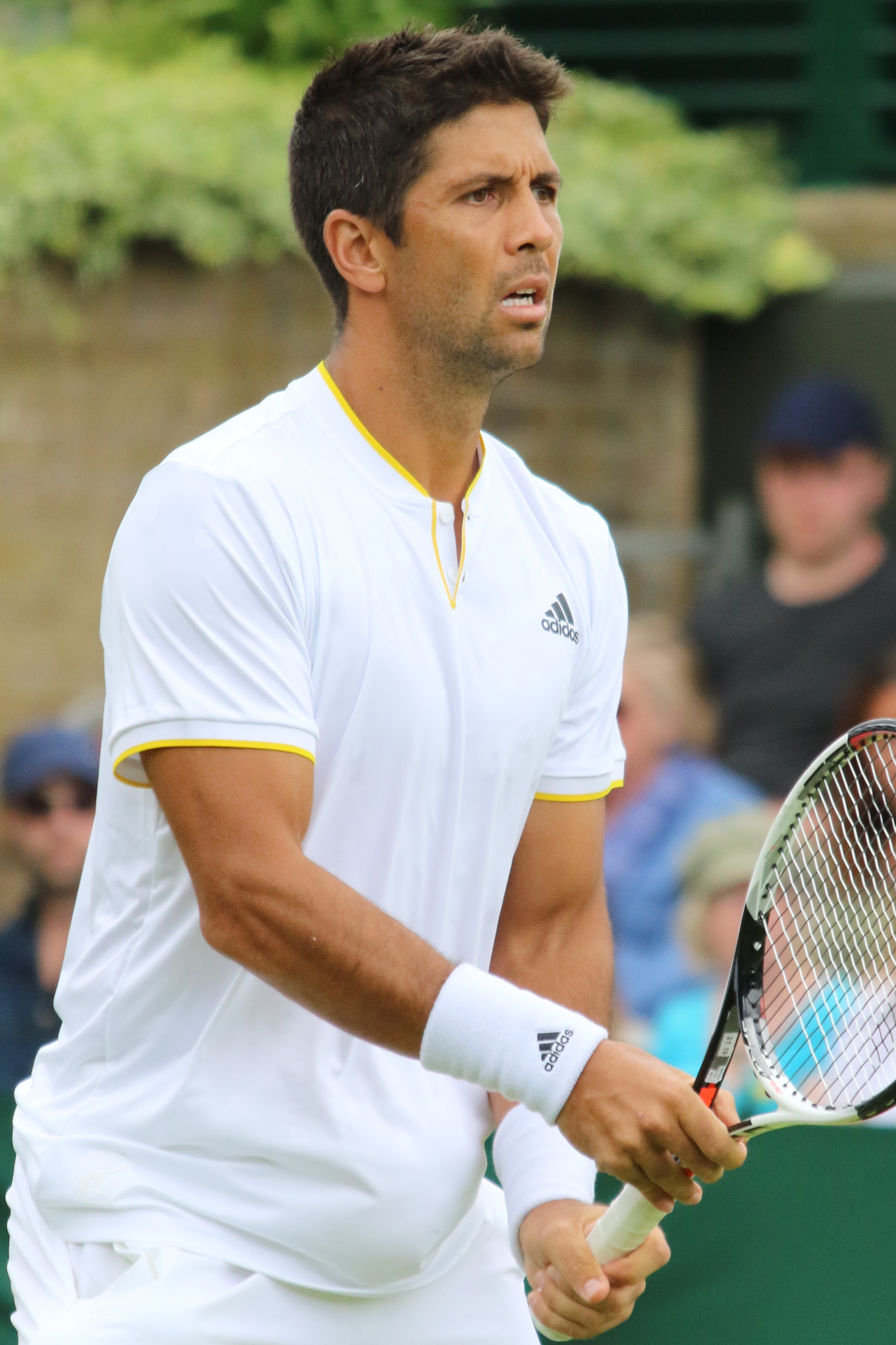 Verdasco WM17 (6)